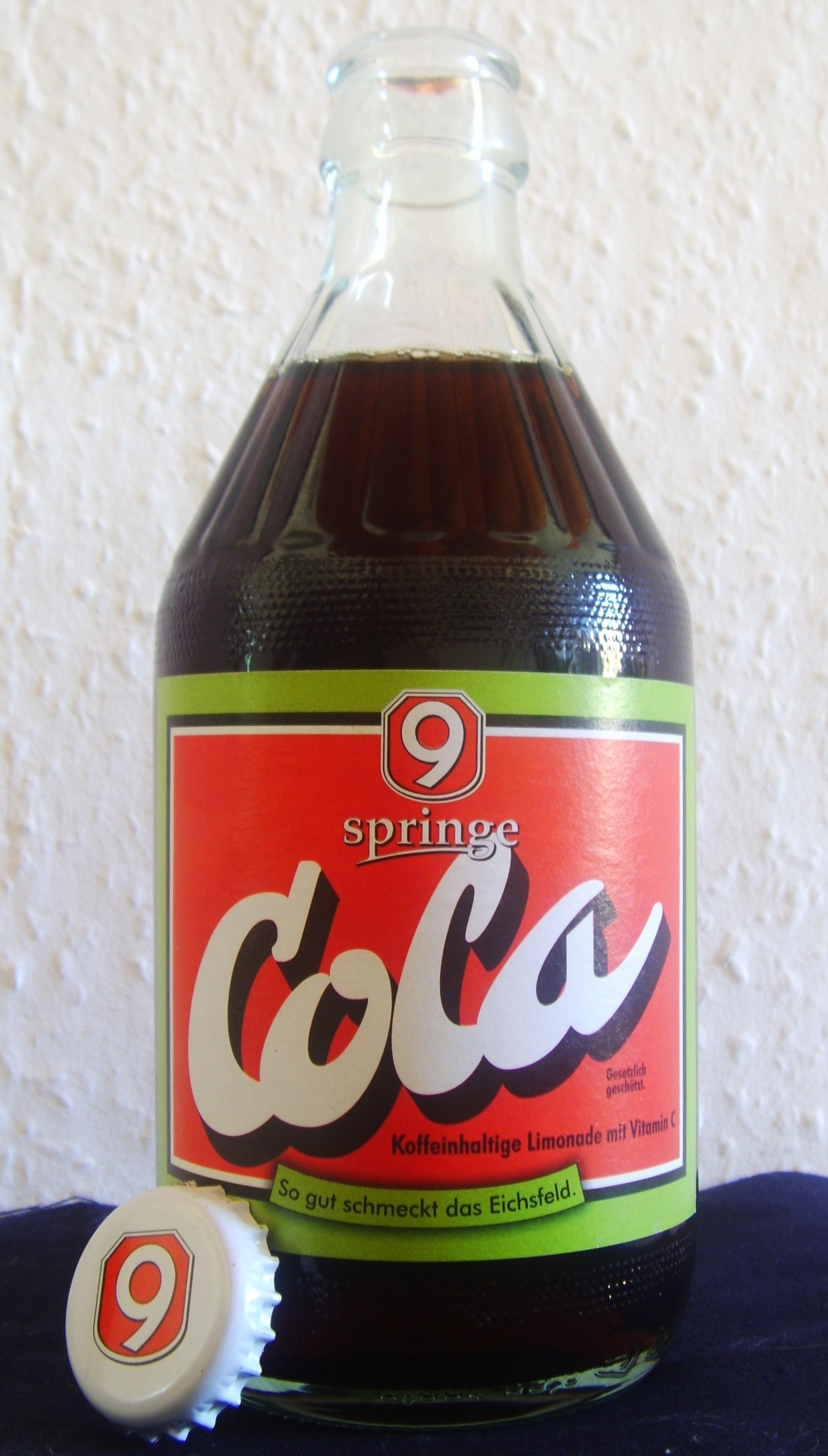 Neunspringe Cola in 0,33l Steini Flasche (typ. Pfandflasche in der DDR)